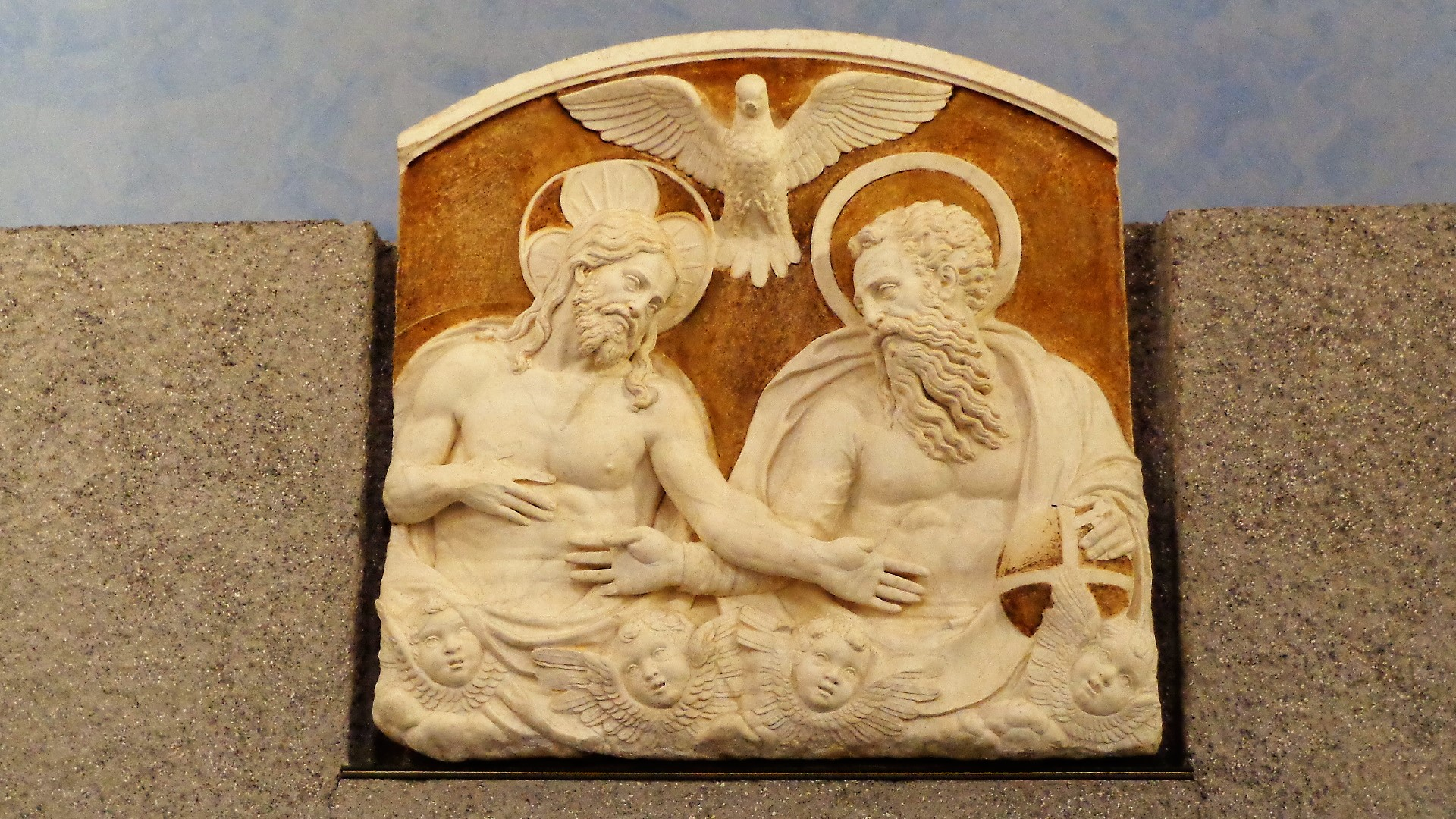 Trinità